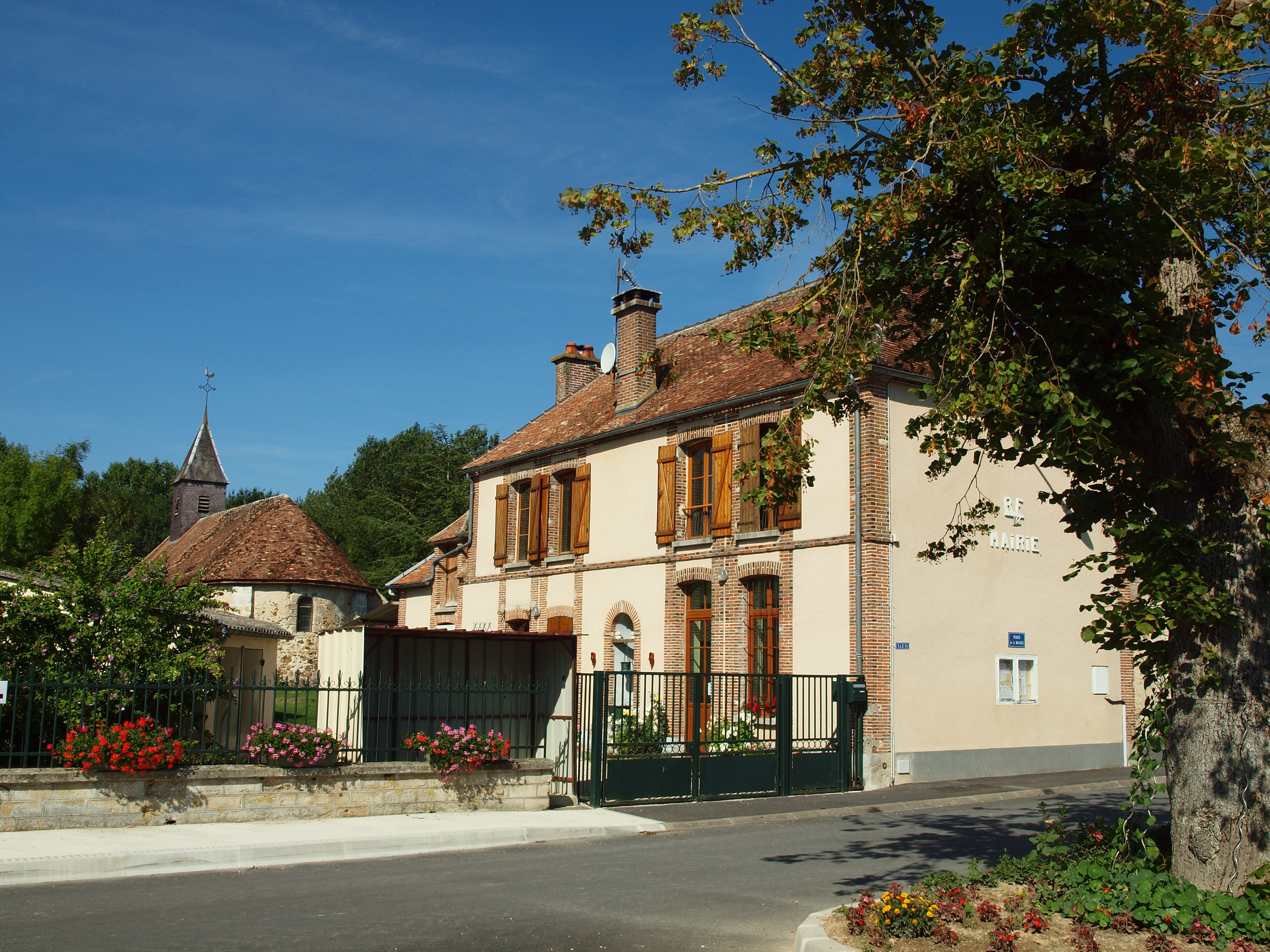 Queudes (Marne, France)